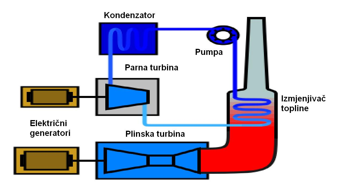 Shema